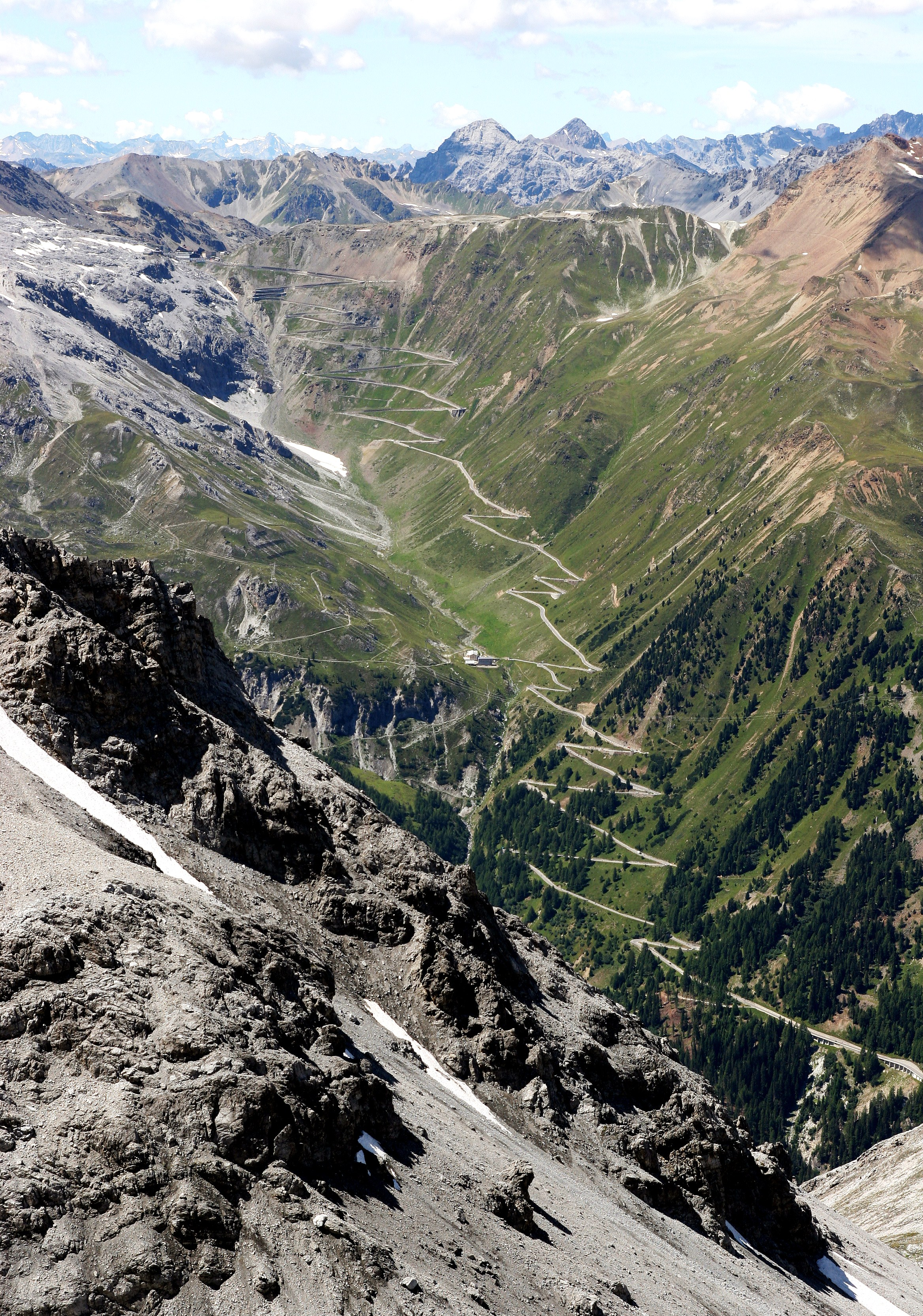 Die Ostrampe des Stilfser Jochs. Fotografiert von der Payerhütte (3029 m ü. NN). In der Bildmitte die Franzenshöhe.